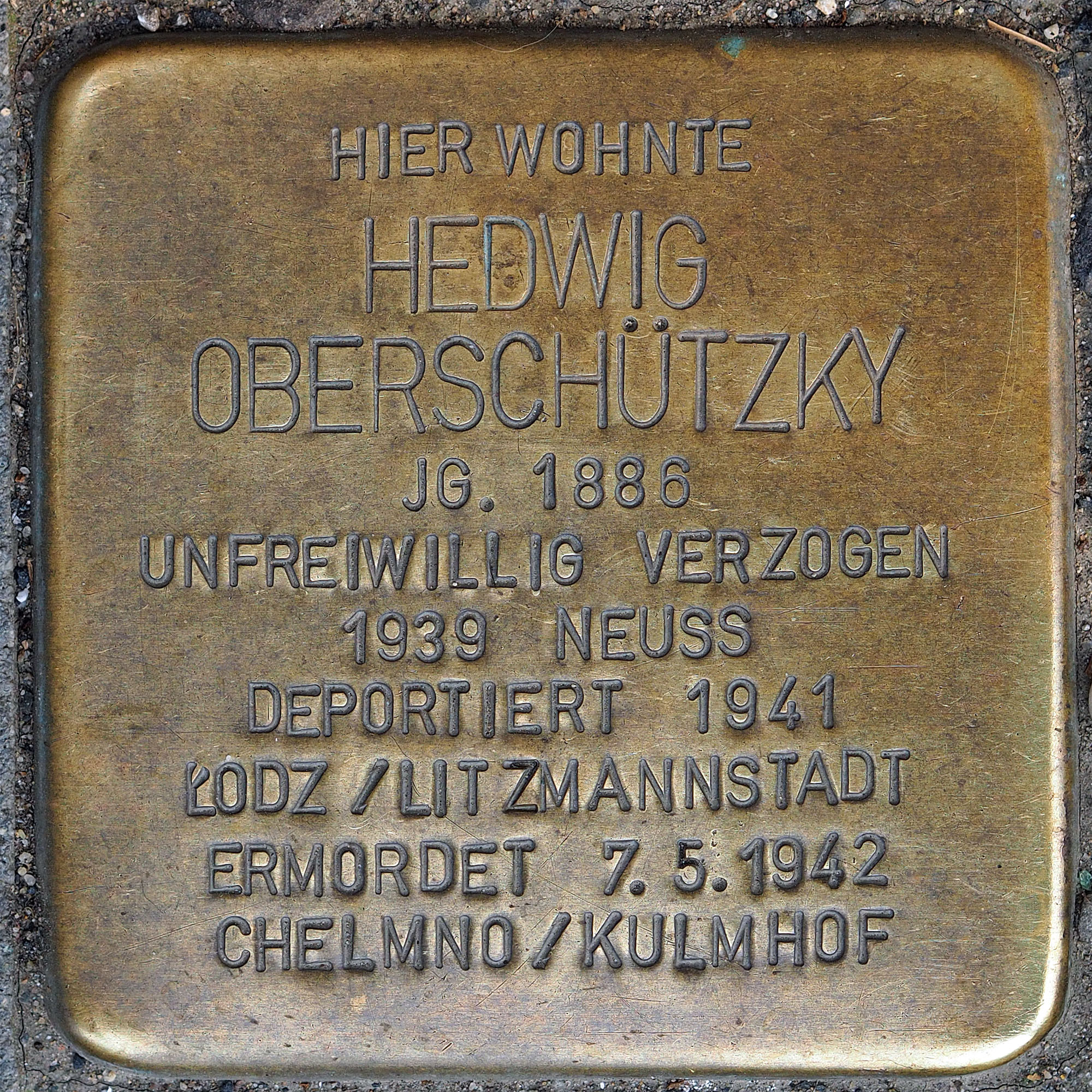 Stolpersteine GV: Oberschützky, Hedwig